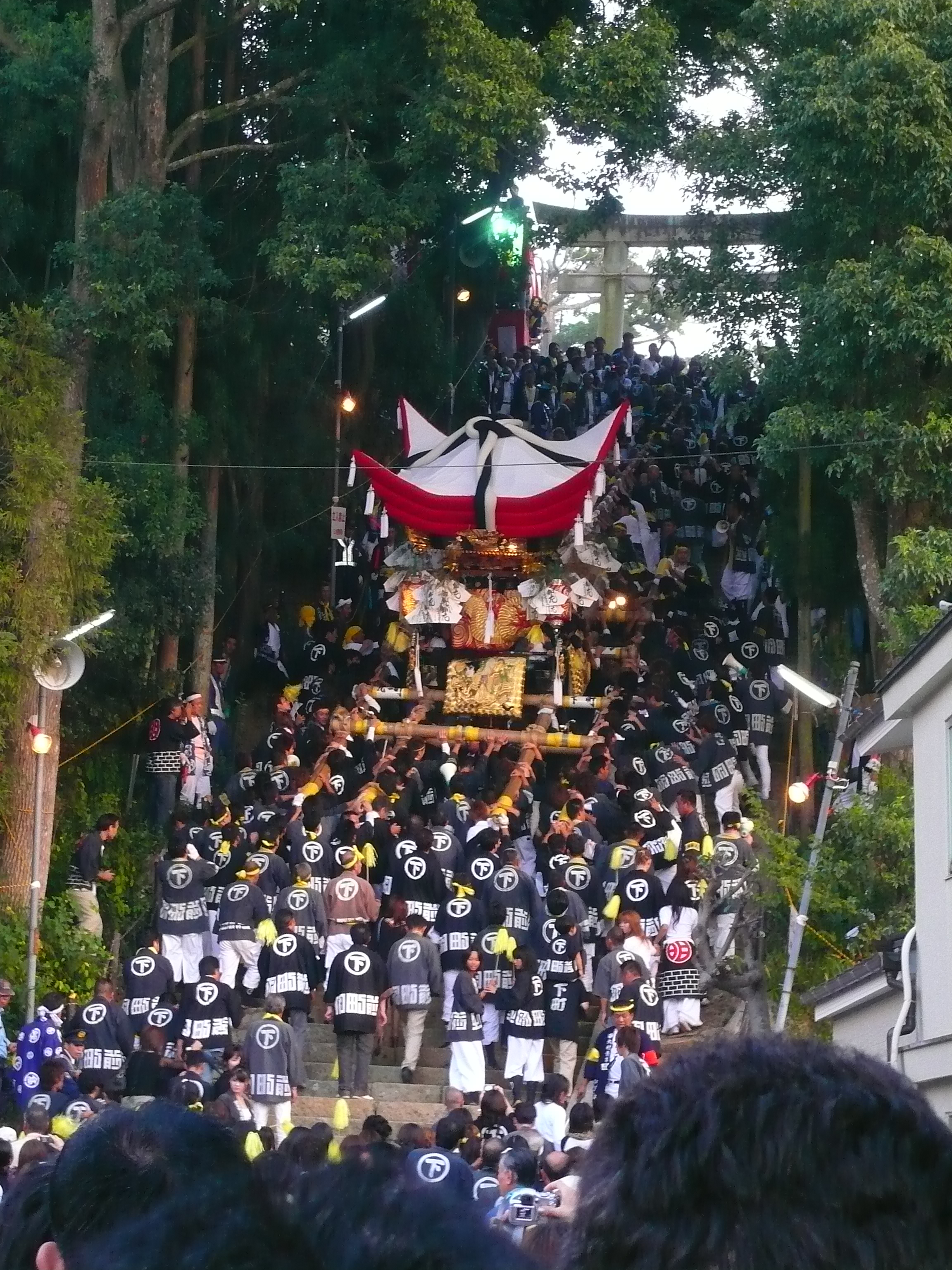 三木大宮八幡宮宮入り